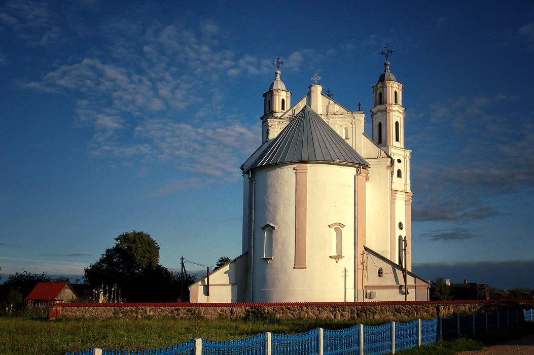 Міхайлаўскі касьцёл This is a photo of Belarusian heritage monument. Reference number: 212Г000839 ( WLM)